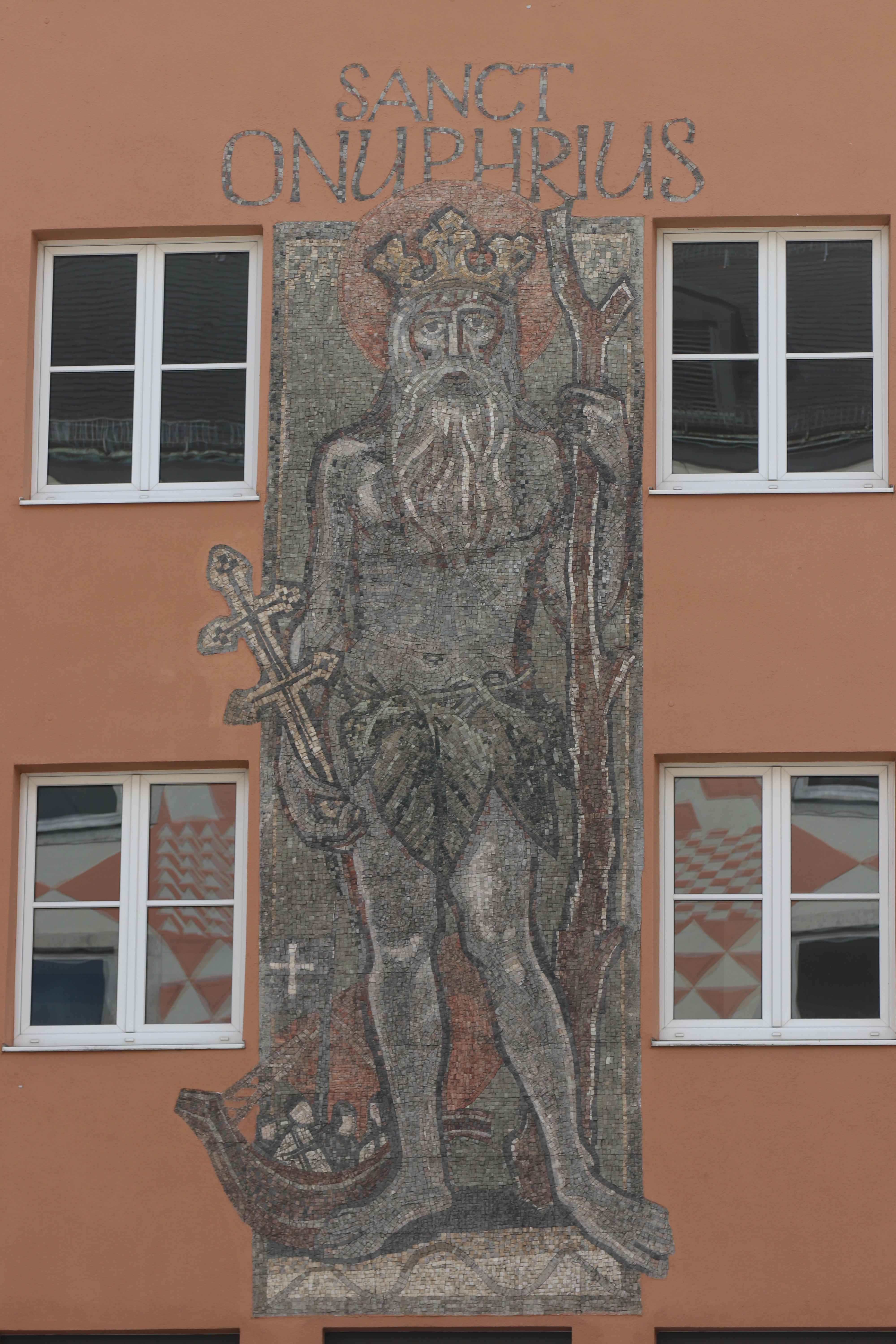 Onuphrius der Große, Stadtpatron von München, als Mosaik an der Fassade des Hauses Marienplatz 17